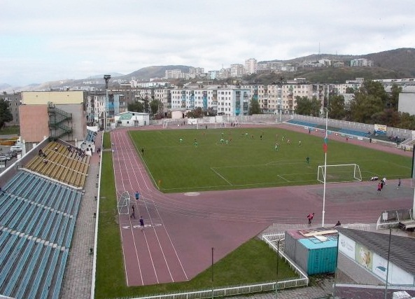 Стадион «Маяк Сахалина» (Холмск)